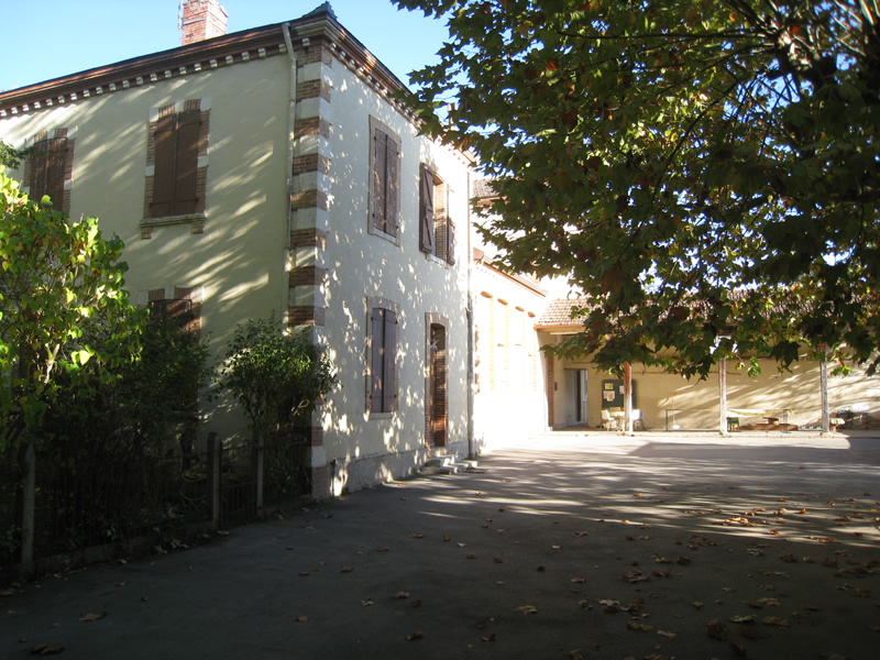 Cour de l'école maternelle de Saint-Laurent (Haute-Garonne)